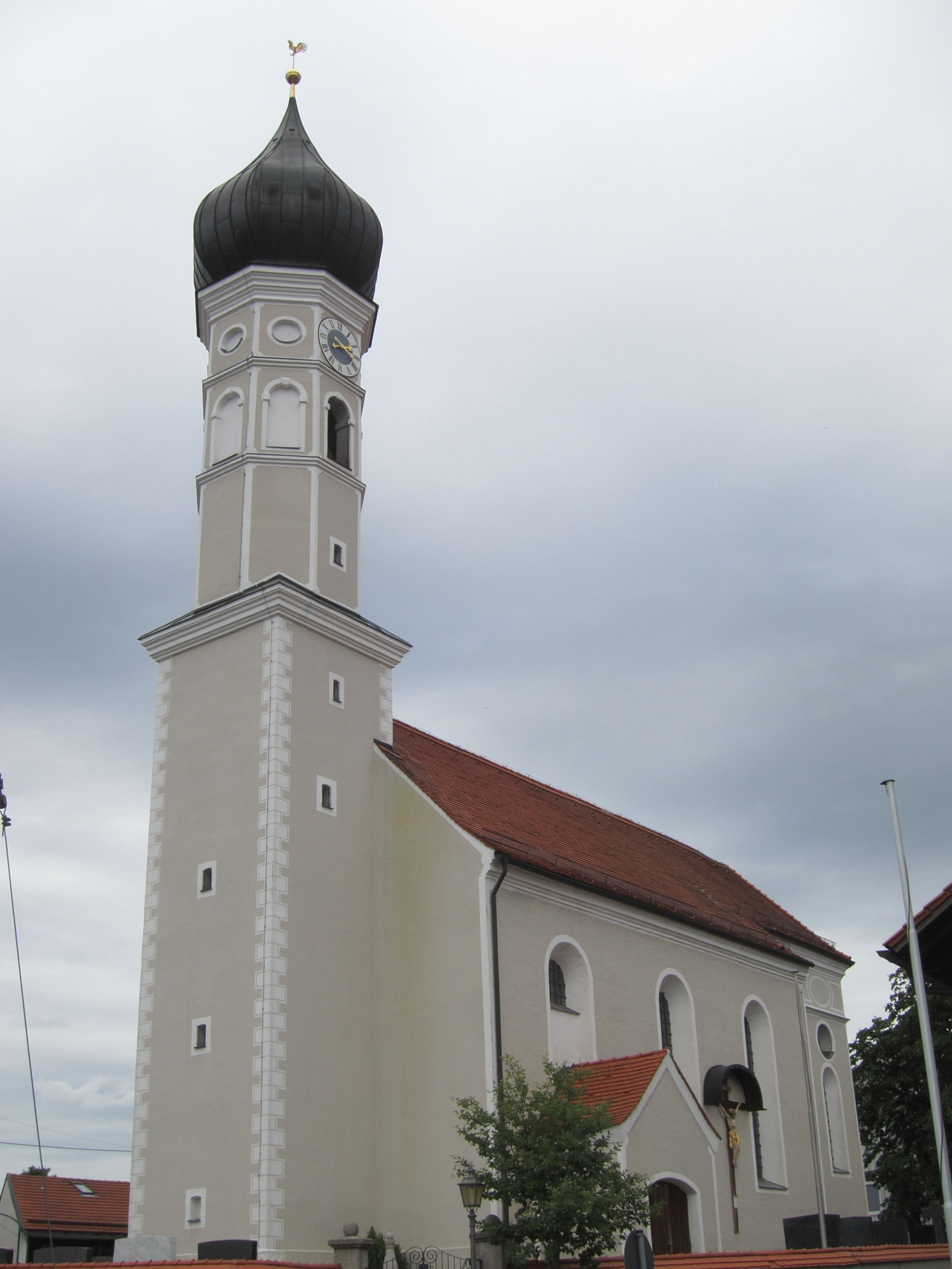 Katholische Filialkirche St. Johannes d.T., barocker Saalbau mit eingezogenem Chor und Zwiebelturm, von Hans Kogler, 1690-93, Turmunterbau und Sakristei spätgotisch; mit Ausstattung.